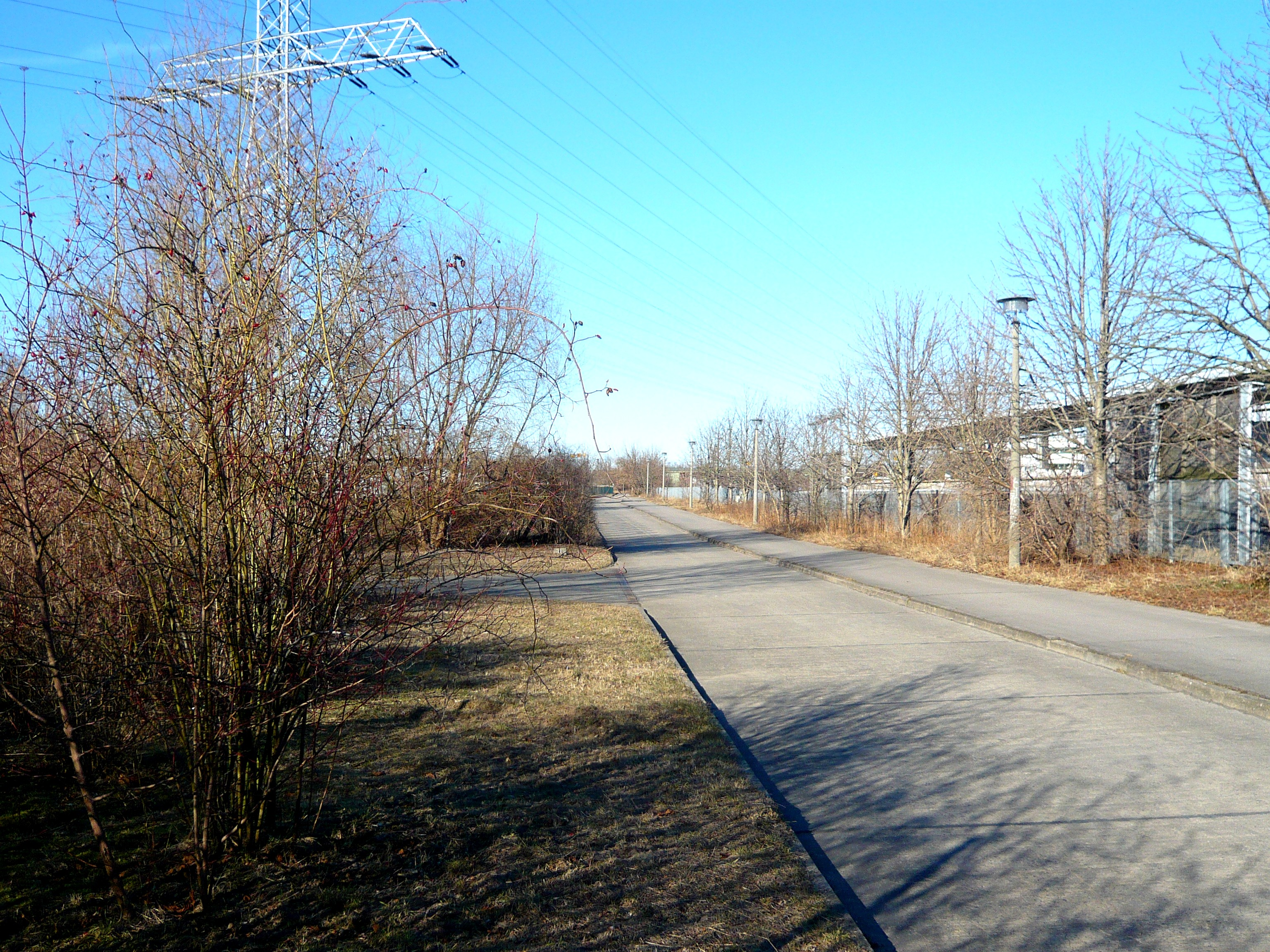 Ortsteil Berlin-Marzahn: Dahmeweg